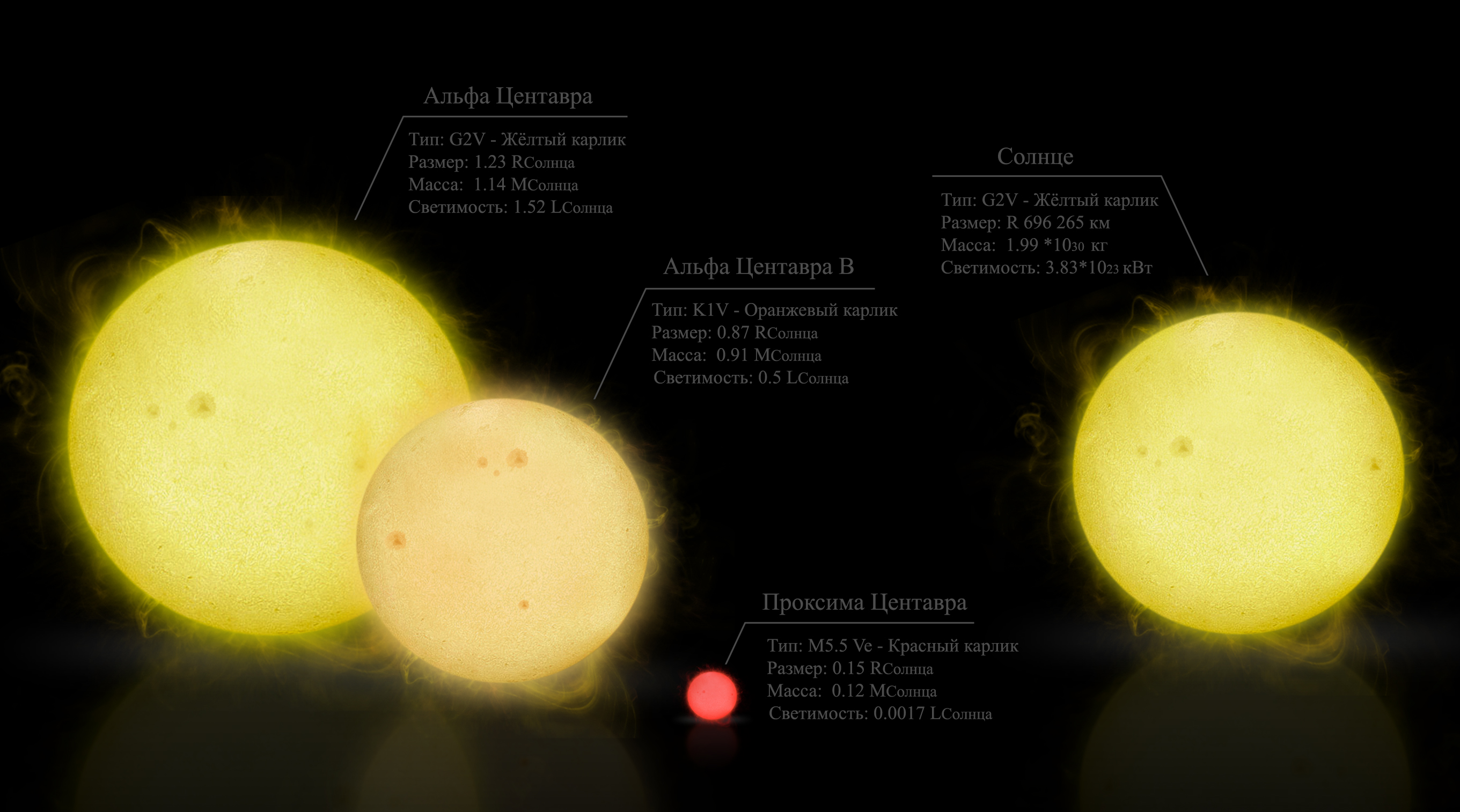 Капцов Руслан Юрьевич 4 января 2011год. Программа Adobe Photoshop CS3 Версия 10.0